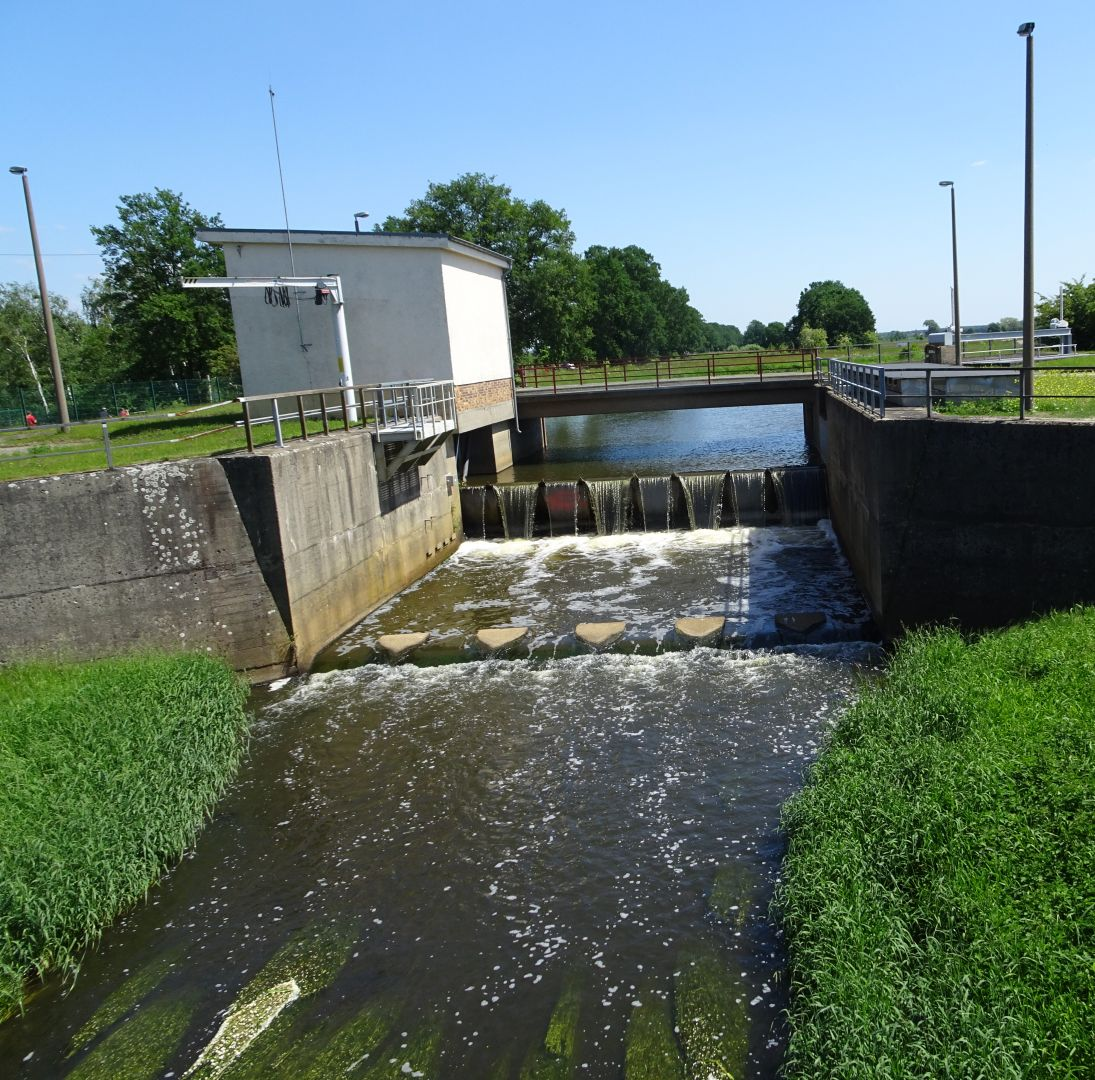 Wehr der Schwarzen Elster bei Großkoschen